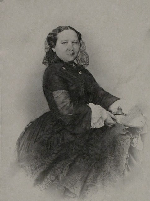 Княгиня Дарья Андреевна Голицына, урожденная Ухтомская (1814—1871)